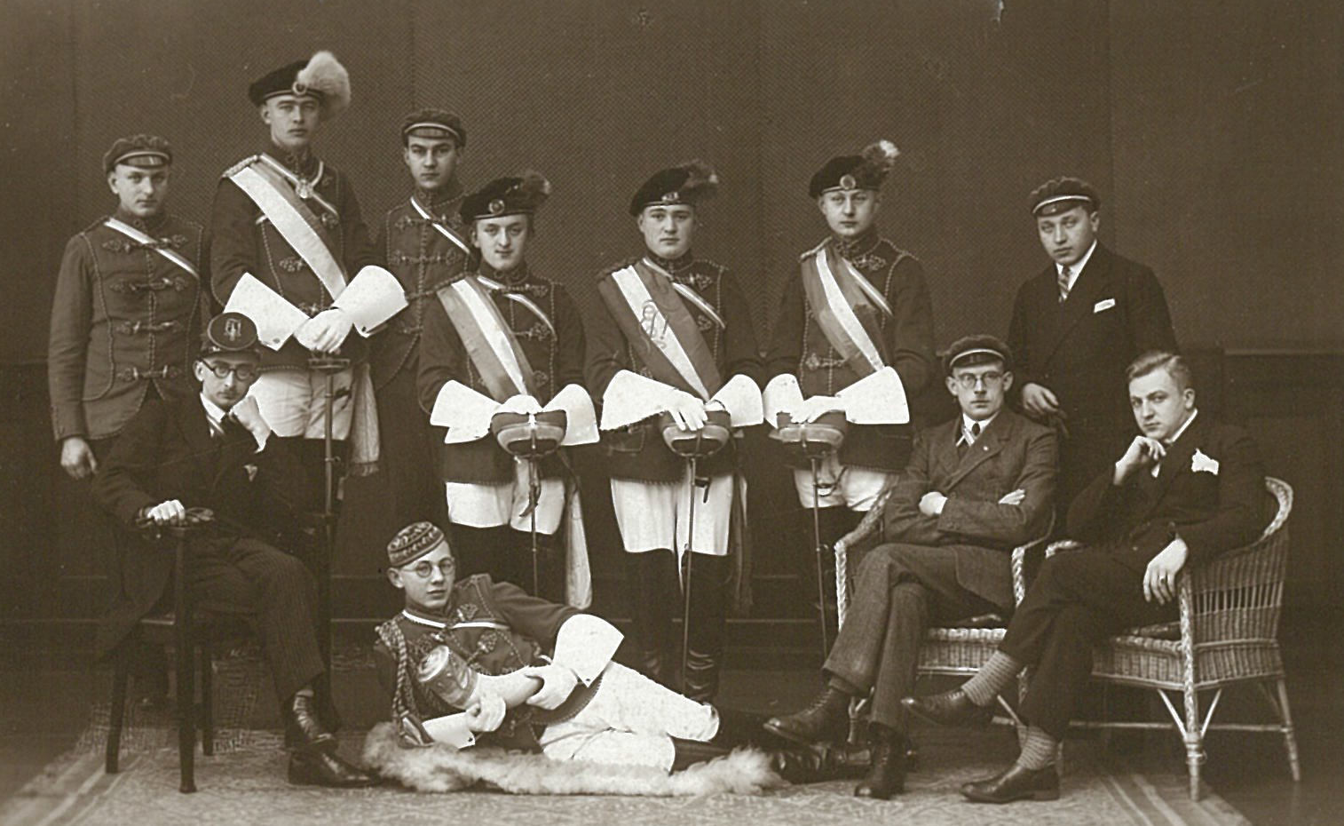 Aktive Mitglieder der Buschenschaft Cheruskia im Mittweidaer Senioren-Cartell